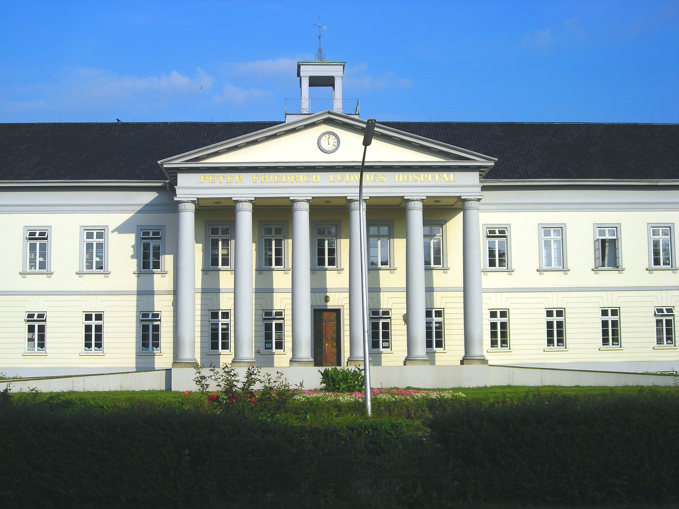 Das PFL wurde 1838-1841 unter der Regentschaft des Großherzogs Paul Friedrich August (1783-1853) erbaut. Benannt wurde es nach seinem Vater Herzog Peter Friedrich Ludwig von Oldenburg (1755-1829).